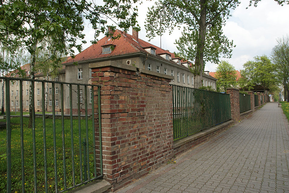 Wałcz koszary wojskowe - 8br